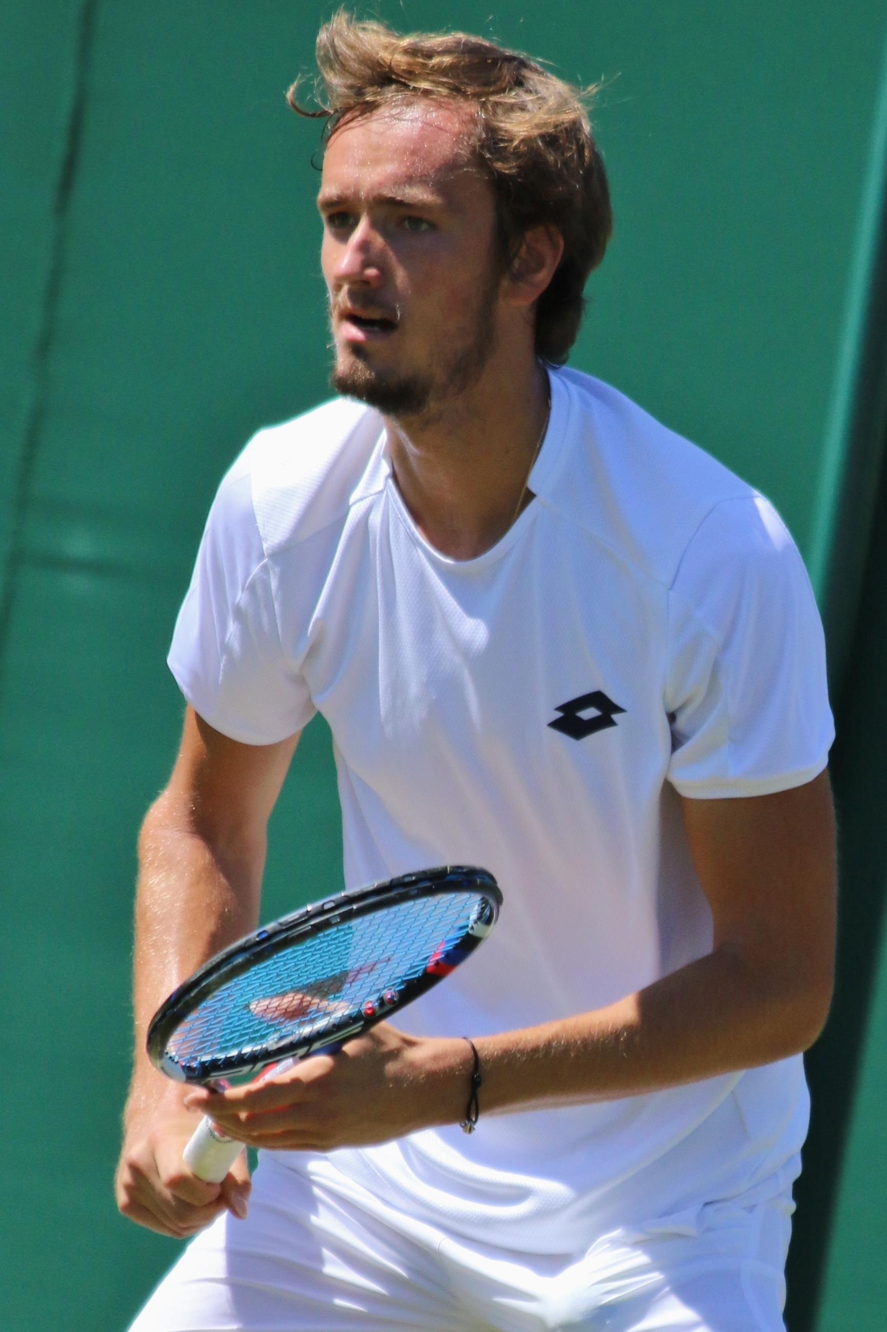 Medvedev WM18 (10)